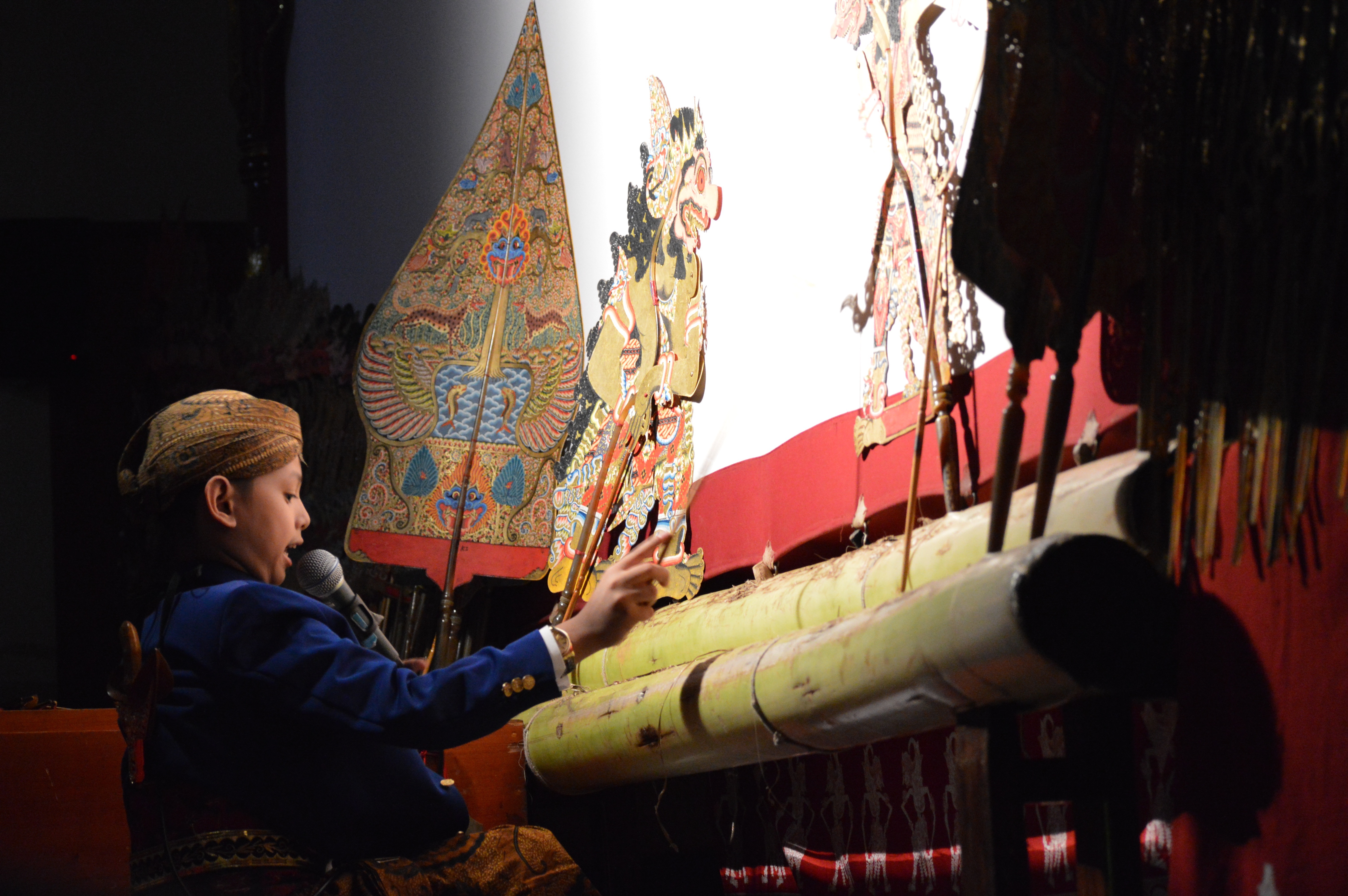 Festival Dalang Cilik yang diselenggarakan di Kota Tua, Jakarta, pada November 2016. Acara tersebut menampilkan sejumlah anak-anak yang masih duduk di sekolah dasar lihai memainkan lakon wayang kulit.